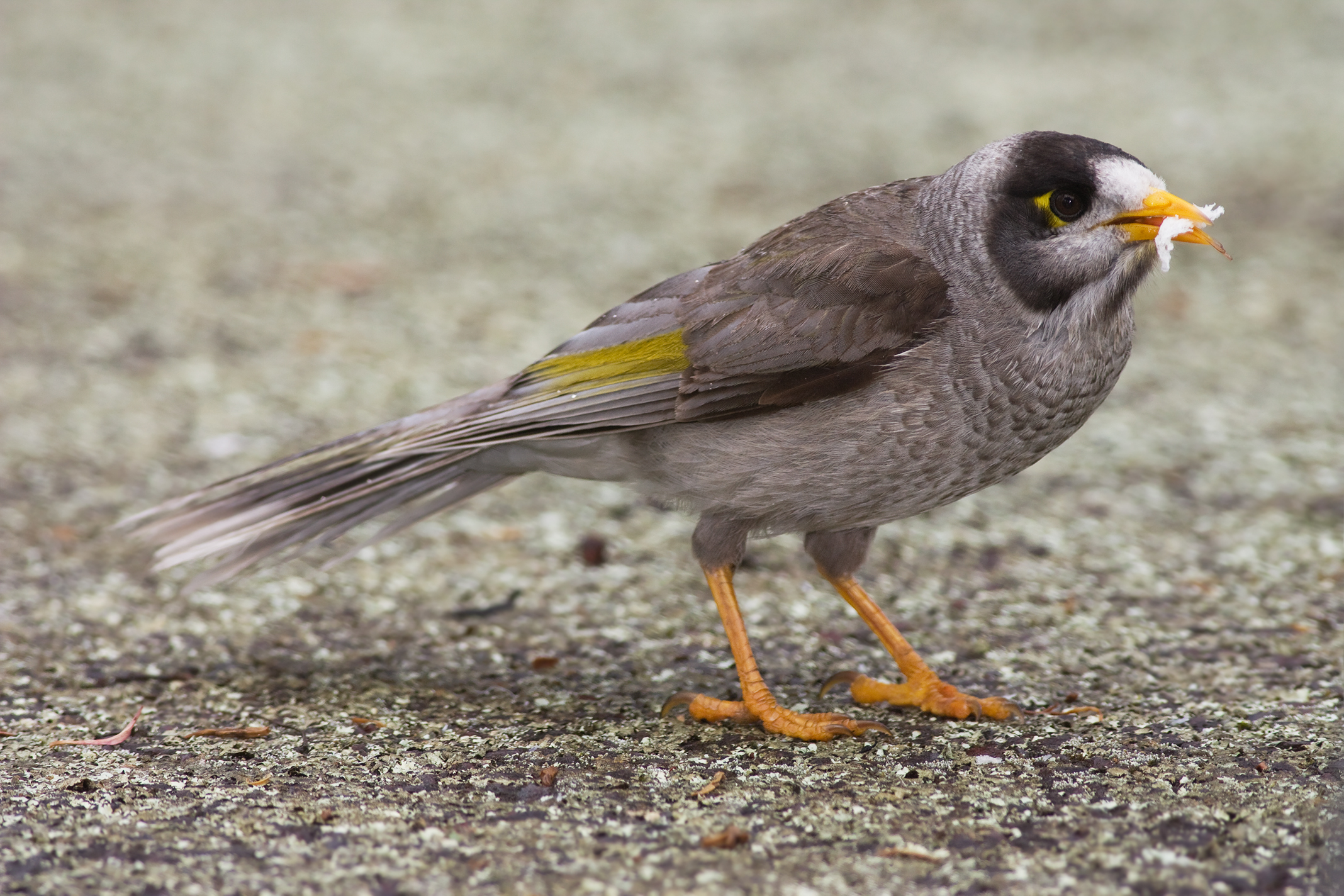 1.2 only